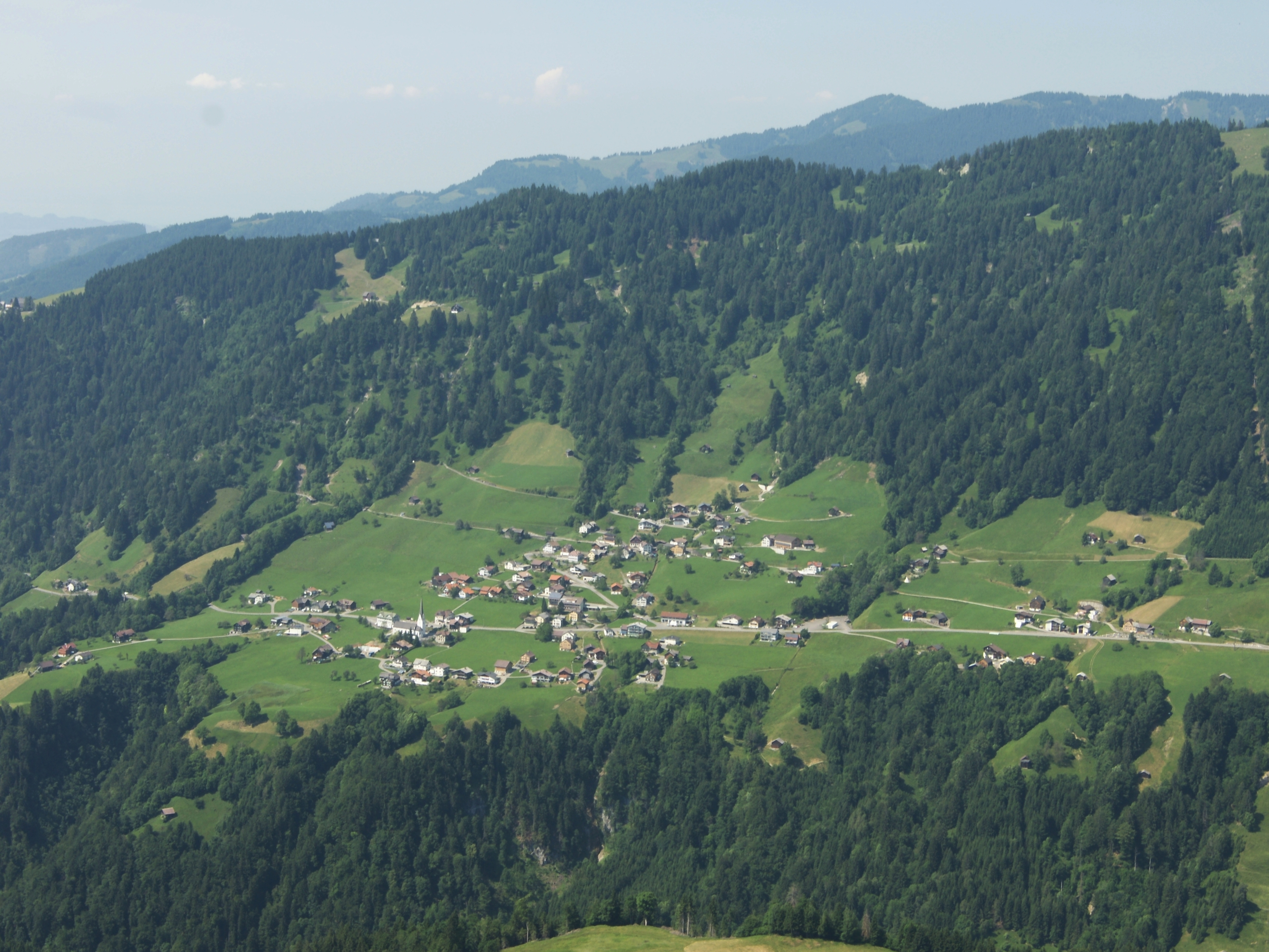 Laterns ist eine Gemeinde in Österreich in Vorarlberg im Bezirk Feldkirch mit 706 Einwohnern (Stand 31. März 2010). Fotografiert oberhalb der gegenüberliegenden "Übersaxner Gulmalpe".